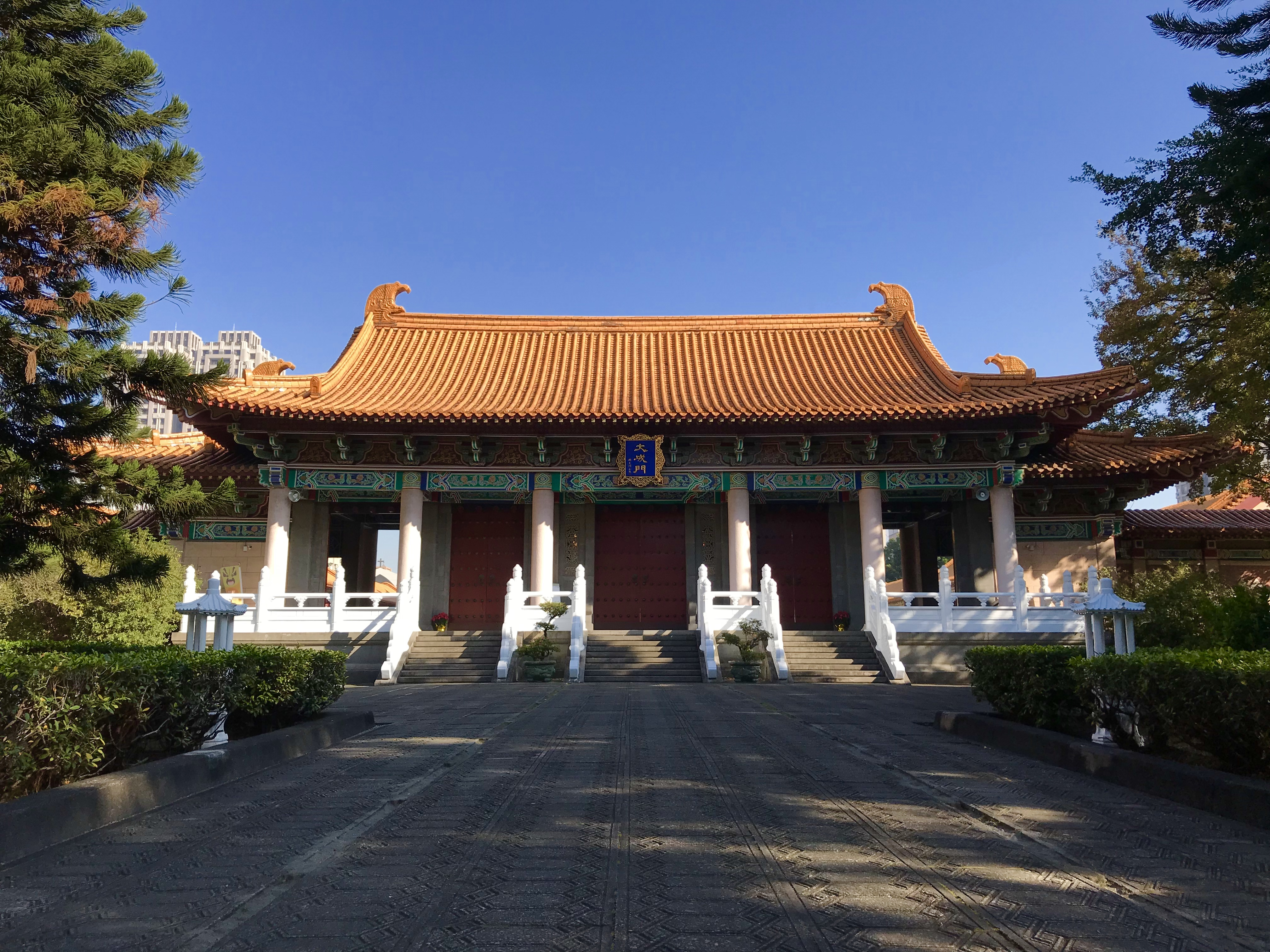 臺中孔子廟大成門